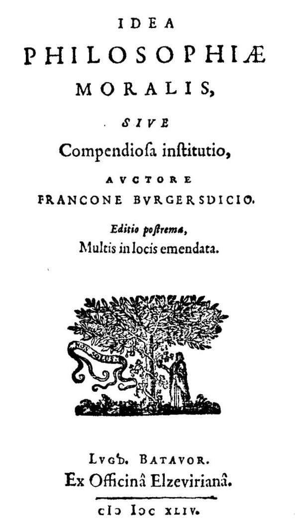 Frontespizio